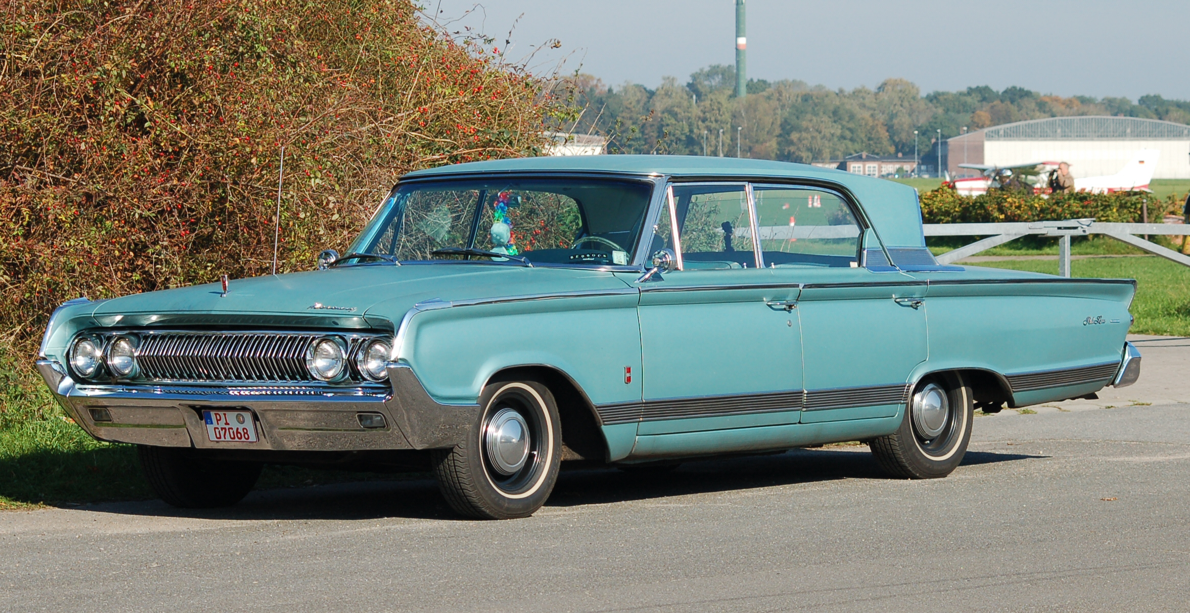 Mercury Park Lane, Baujahr 1964 auf dem Flugplatz Uetersen